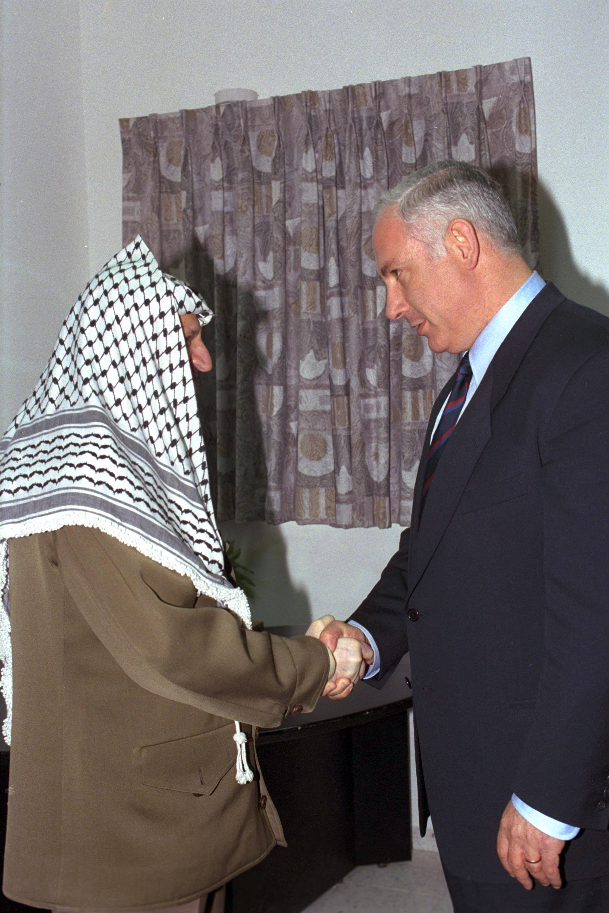 P.M. BENJAMIN NETANYAHU SHAKING HANDS WITH PALESTINIAN AUTHORITY CHAIRMAN YASSER ARAFAT DURING THEIR MEETING AT THE EREZ CHECKPOINT IN THE GAZA STRIP.(04/09/1996) לחיצת יד בין ראש הממשלה בנימין נתניהו ליו"ר הרשות הפלסטינאית יאסר עראפת, בפגישה שנערכה בין השניים במחסום ארז. Photo: Moshe Milner (1946–) Alternative names Miylner, Moše; Milner, Mosheh; Moshé Milner; Milner, M.; Mîlner, Moše; Miylner, MošehDescriptionIsraeli photographerצלם ישראליDate of birth 1946 Location of birth Germany Authority control : Q28750411 VIAF: 100999744 ISNI: 0000 0001 0804 0507 LCCN: n82072104 GND: 115699732 BNF: 15548788n WorldCat creator QS:P170,Q28750411 .